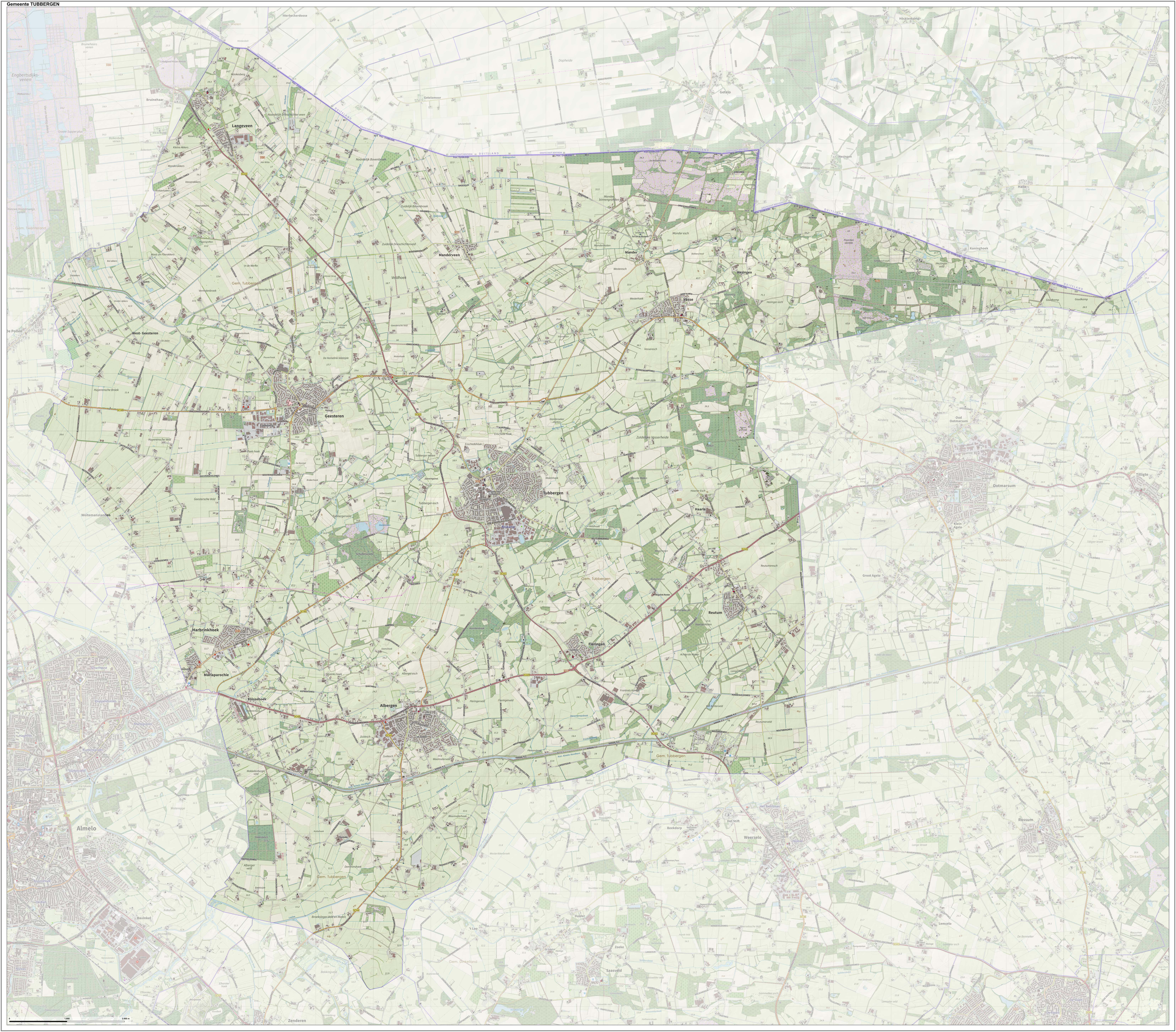 Topografische gemeentekaart. Resolutie: 400 pixels/km. Kaartbeeld samengesteld uit de open geodata van de Top10NL en Top25namen (Kadaster), Creative Commons-BY licentie. Gebouwvlakken uit open geodata BAG extract. Wegen uit de OpenStreetMap, OpenStreetMap community. Reliëfschaduw uit de Actuele Hoogtekaart AHN2. Samenstelling en kleurenschema: Jan-Willem van Aalst, met QGIS. Zie ook de Legenda.